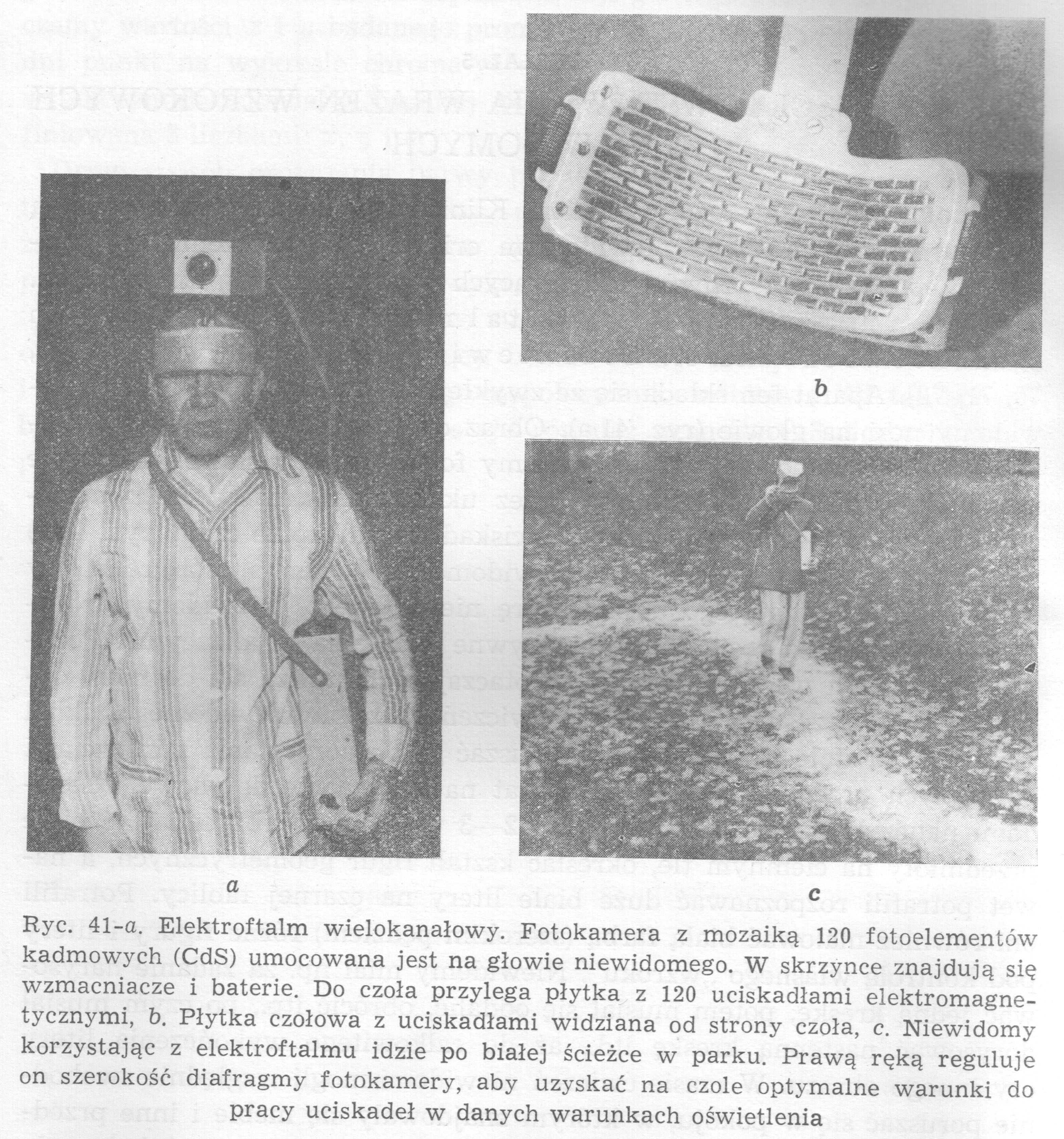 Elektroftalm wielokanałowy - model "zastępczego oka" dla niewidomych